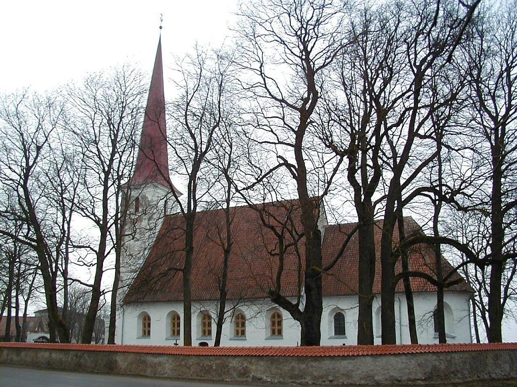 Nurmuižas luterāņu baznīca Laucienē 2001-04-01